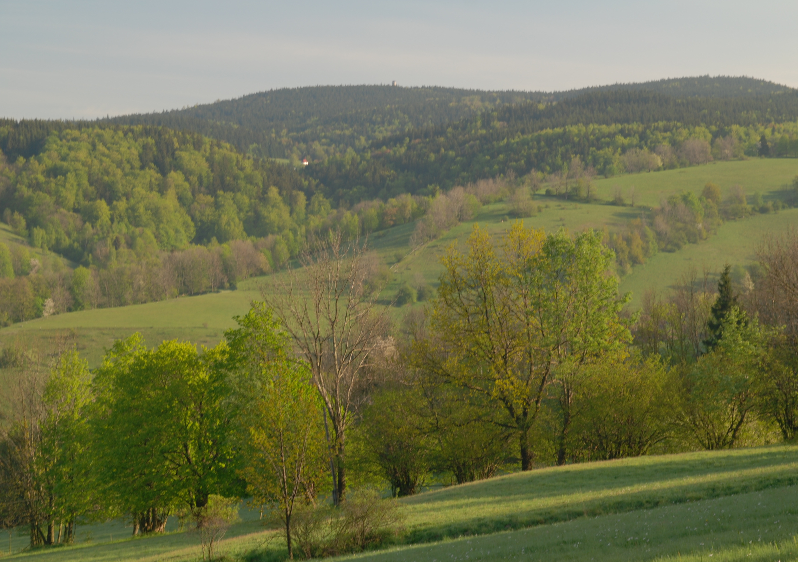 wieś Lutynia (powiat kłodzki)